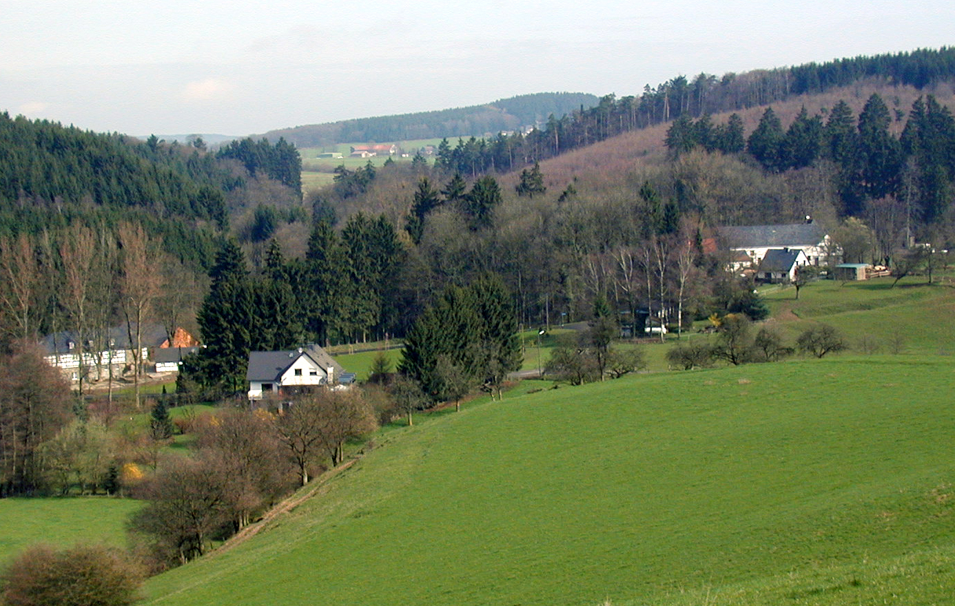 Blick auf Unterheiligenhoven